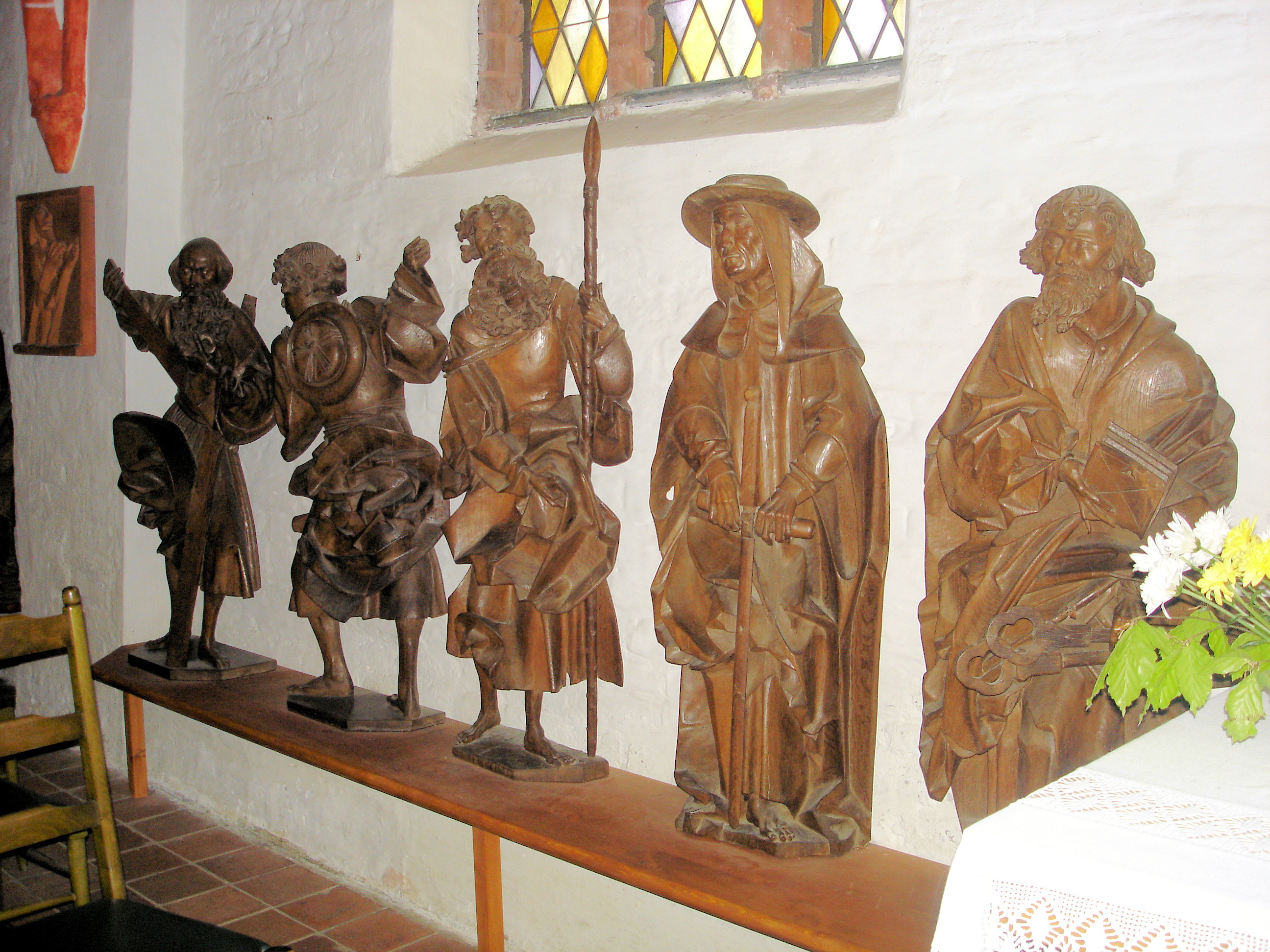 Heiligenfiguren im Dom in Güstrow